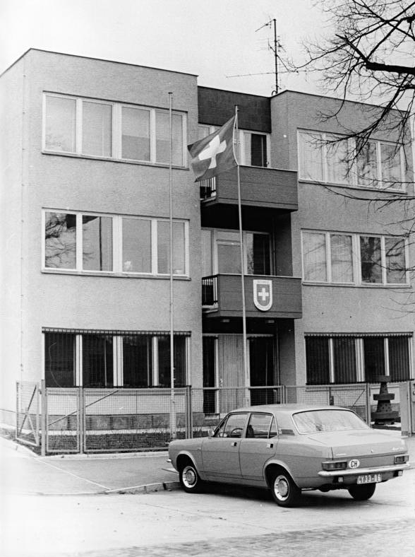 Berlin, Schweizer Botschaft ADN-ZB Deutsche Demokratische Republik 22.3.1973 schw Botschaftsgebäude der Schweiz in der DDR-Hauptstadt Berlin Unser Foto zeigt das Gebäude der diplomatischen Vertretung der Schweizerischen Eidgenossenschaft in der DDR, die in der Esplanade 21 in BERLIN ihren Sitz hat. Foto: Koard